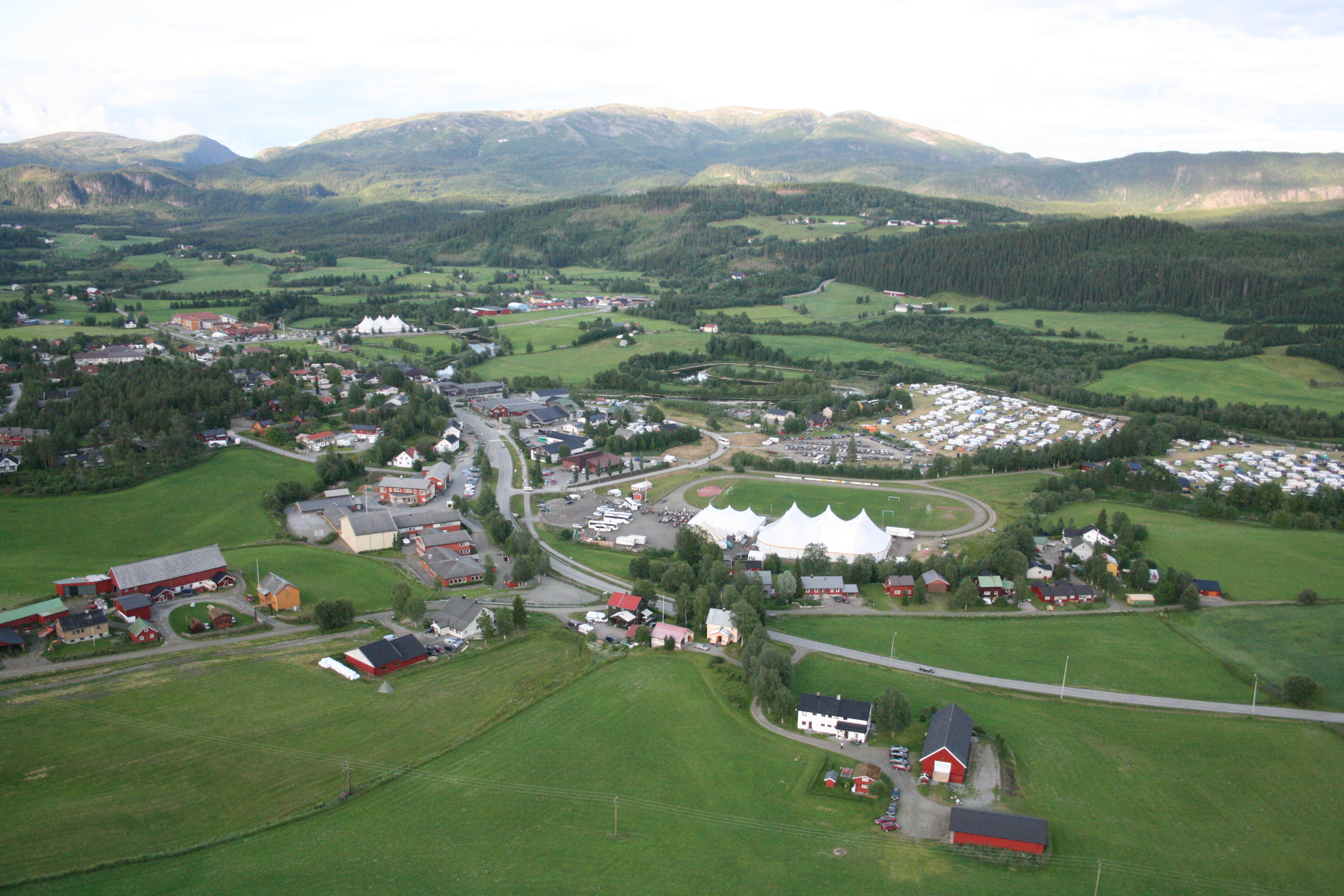 Høylandet frå lufta under Norsk revyfestival 2007